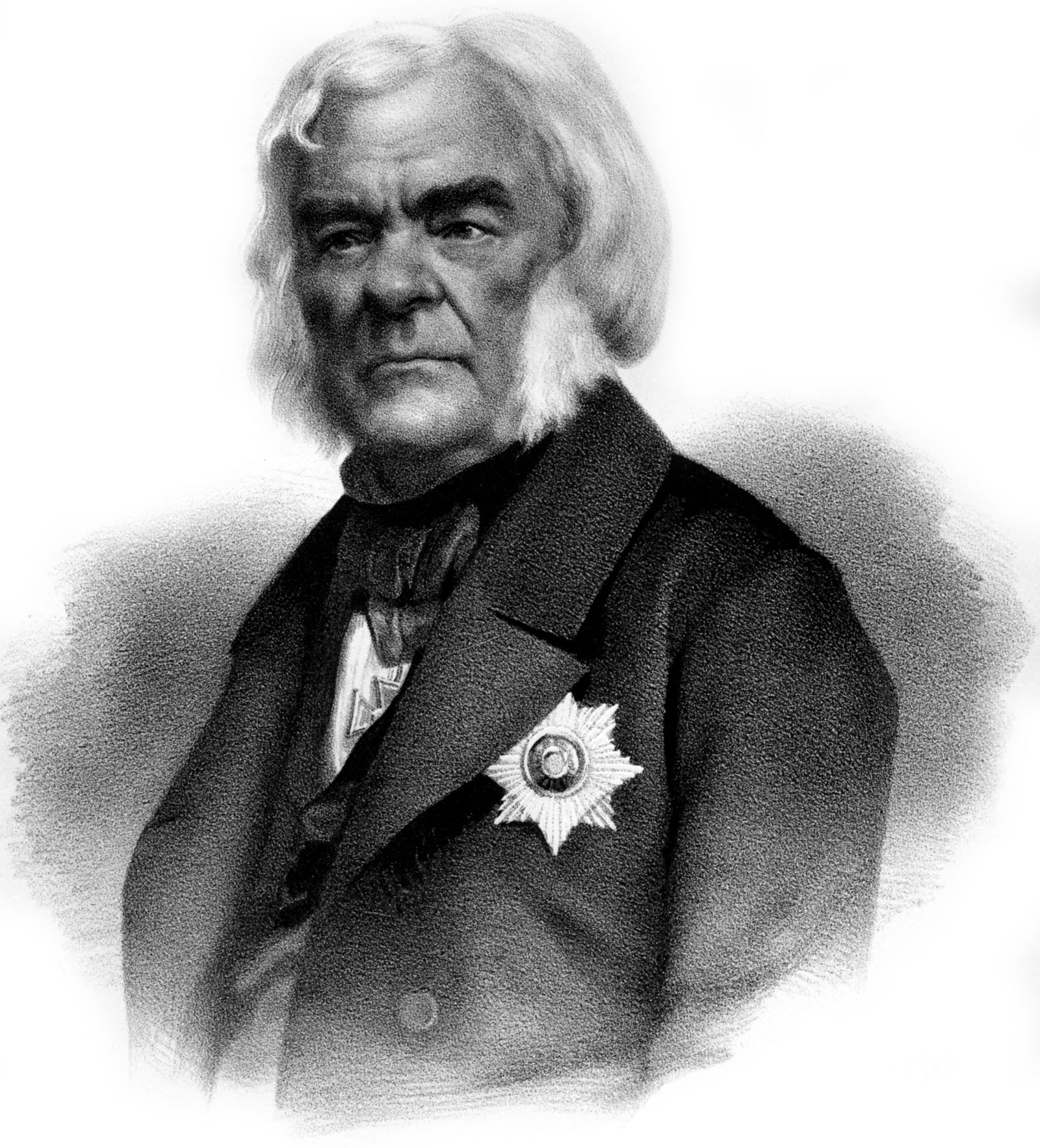 A. VOSSTOKOF. Съ Фотографiи. Лит. А. Мюнстера, СПБ. Imp. Lith. A. Munster (Editeur)